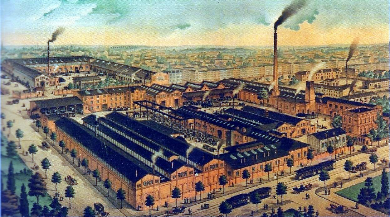 Hallesche Maschinenfabrik und Eisengießerei A.G., Chromolithografie